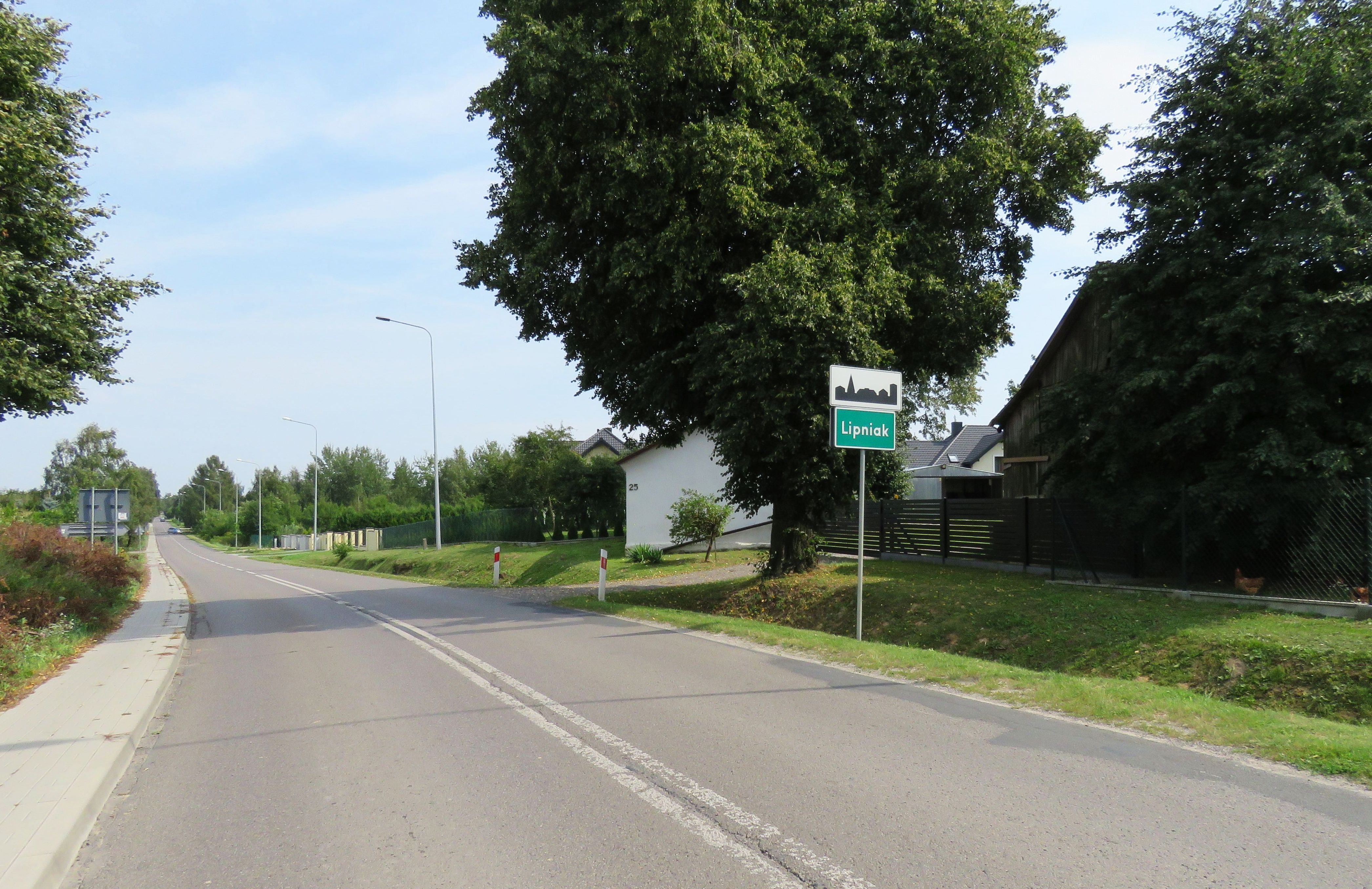 Kolonia Lipniak